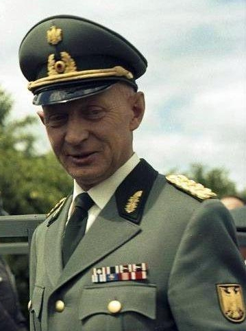 Inspekteur des Bundesgrenzschutzes, Brigadegeneral Alfred Samlowski